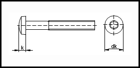 ISO 14583